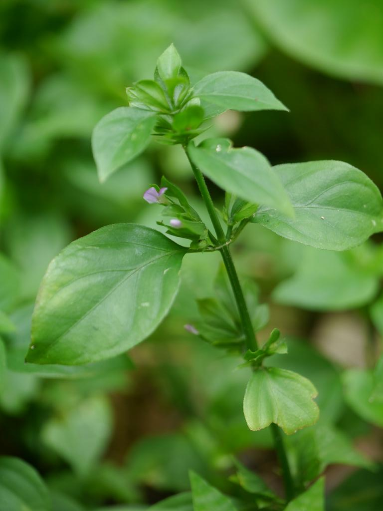 Dicliptera chinensis：ヤンバルハグロソウ 2015/08/27 沖縄本島：Okinawa Island, Japan